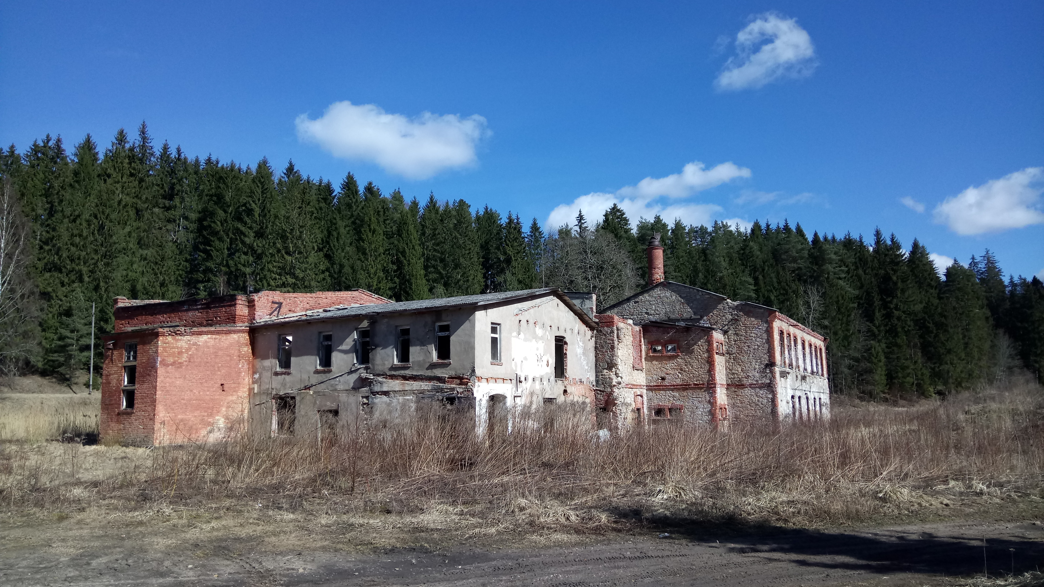 Handfabrika (Ānfabrika) mūsdienās